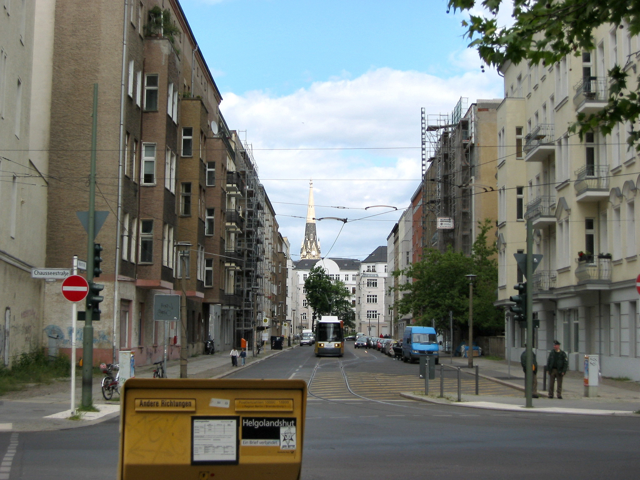 Ein Blick von der Chaussee- in die Wöhlertstraße im Jahre 2004.